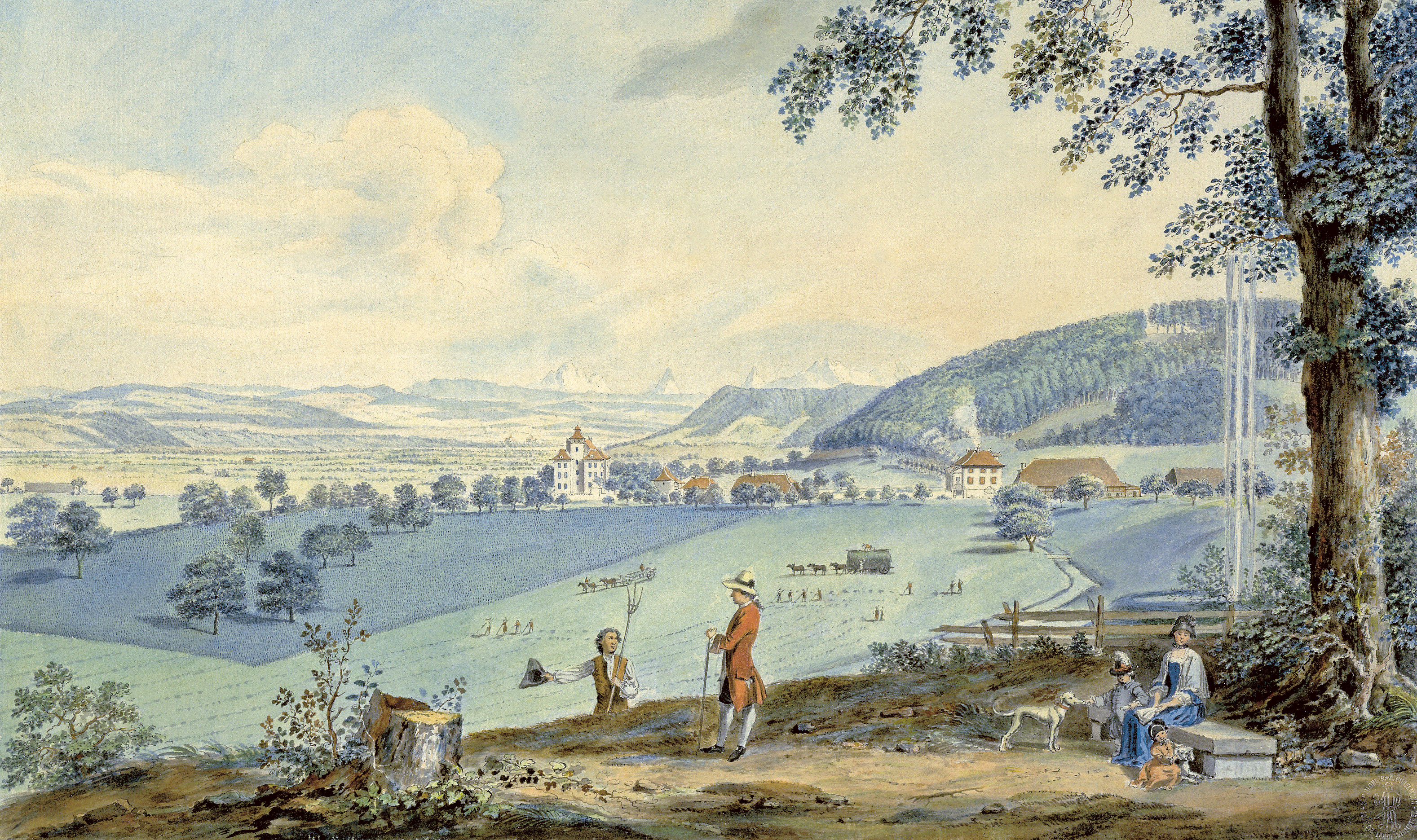 Niklaus Emanuel Tscharner auf seinem Gut Blumenhof bei Kehrsatz im Gespräch mit einem Landmann